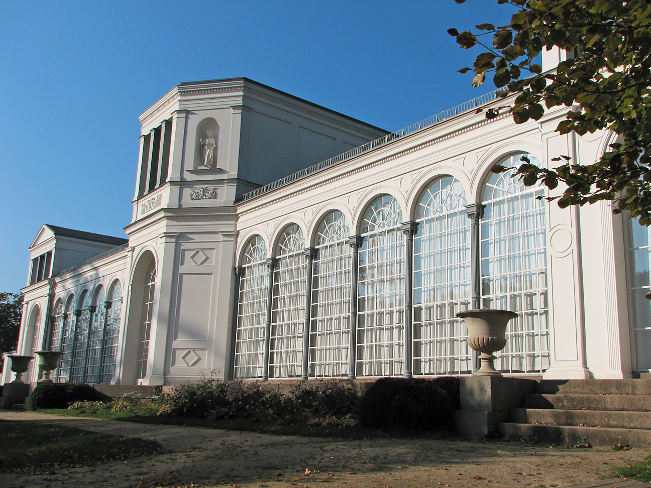 Beschreibung: Rückseite der Orangerie in Putbus, Germany. Fotograf: Darkone, 12. Oktober 2005